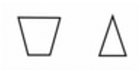 Forma del injerto en el plano lateral (izquierda) y en el plano axial (derecha)